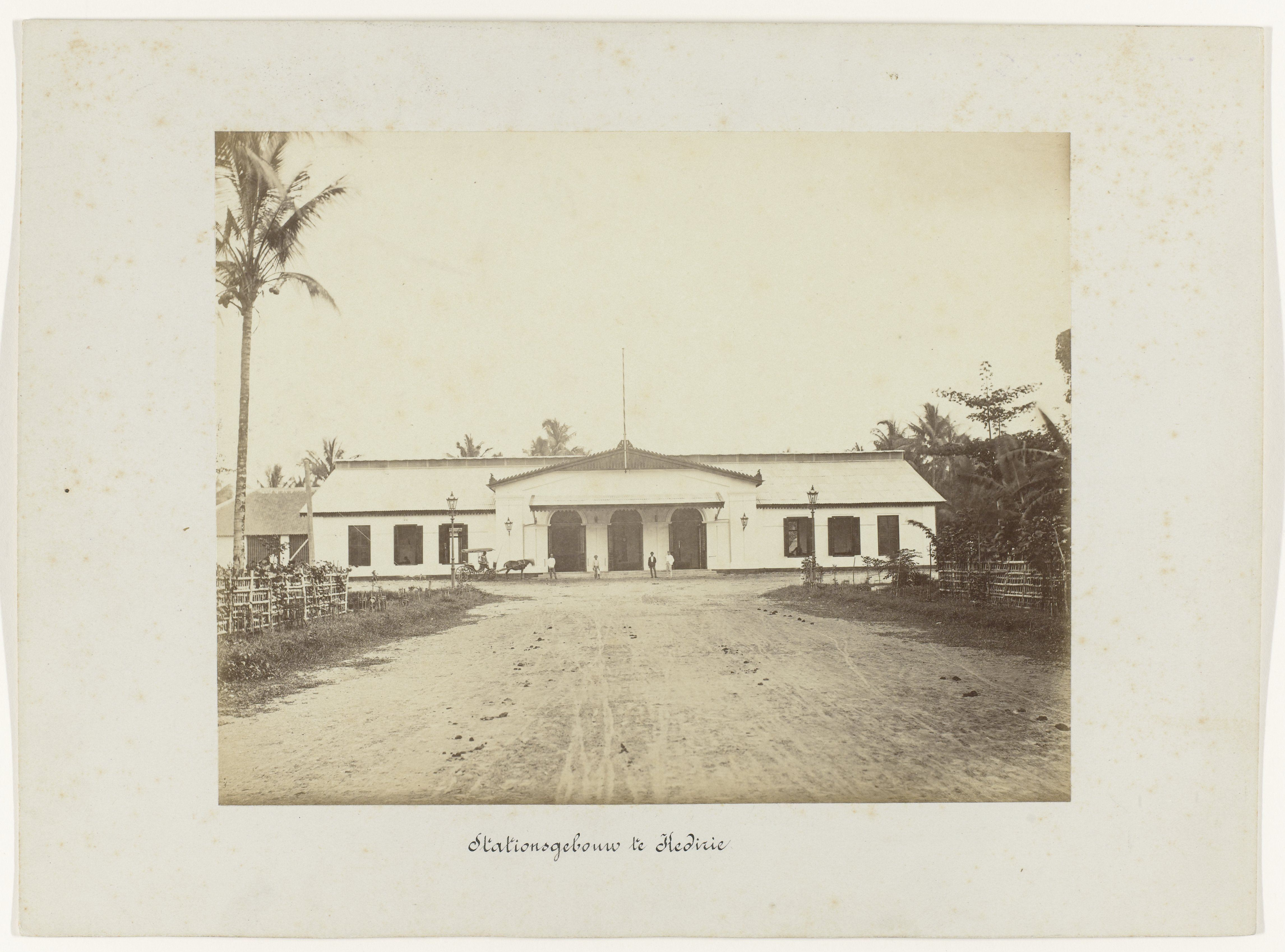 IdentificatieTitel(s): Stationsgebouw te Kedirie (titel op object)Staatsspoorwegen op Java (serietitel)Objecttype: foto Objectnummer: NG-1988-26-34Omschrijving: De buitenkant van het stationsgebouw te Kedirie, voor de ingang enkele mannen en een koets. Onderdeel van een groep van 62 foto's in een doos met het opschrift "Staatsspoorwegen op Java" uit 1888.VervaardigingVervaardiger: fotograaf: anoniemPlaats vervaardiging: JavaDatering: 1880 - 1888Fysieke kenmerken: albuminedrukMateriaal: fotopapier Techniek: albuminedrukAfmetingen: foto: h 175 mm × b 210 mmkarton: h 250 mm × b 230 mmOnderwerpWanneer: 1880 - 1888Waar: KediriVerwerving en rechtenVerwerving: aankoop 30-aug-1988Copyright: Publiek domein